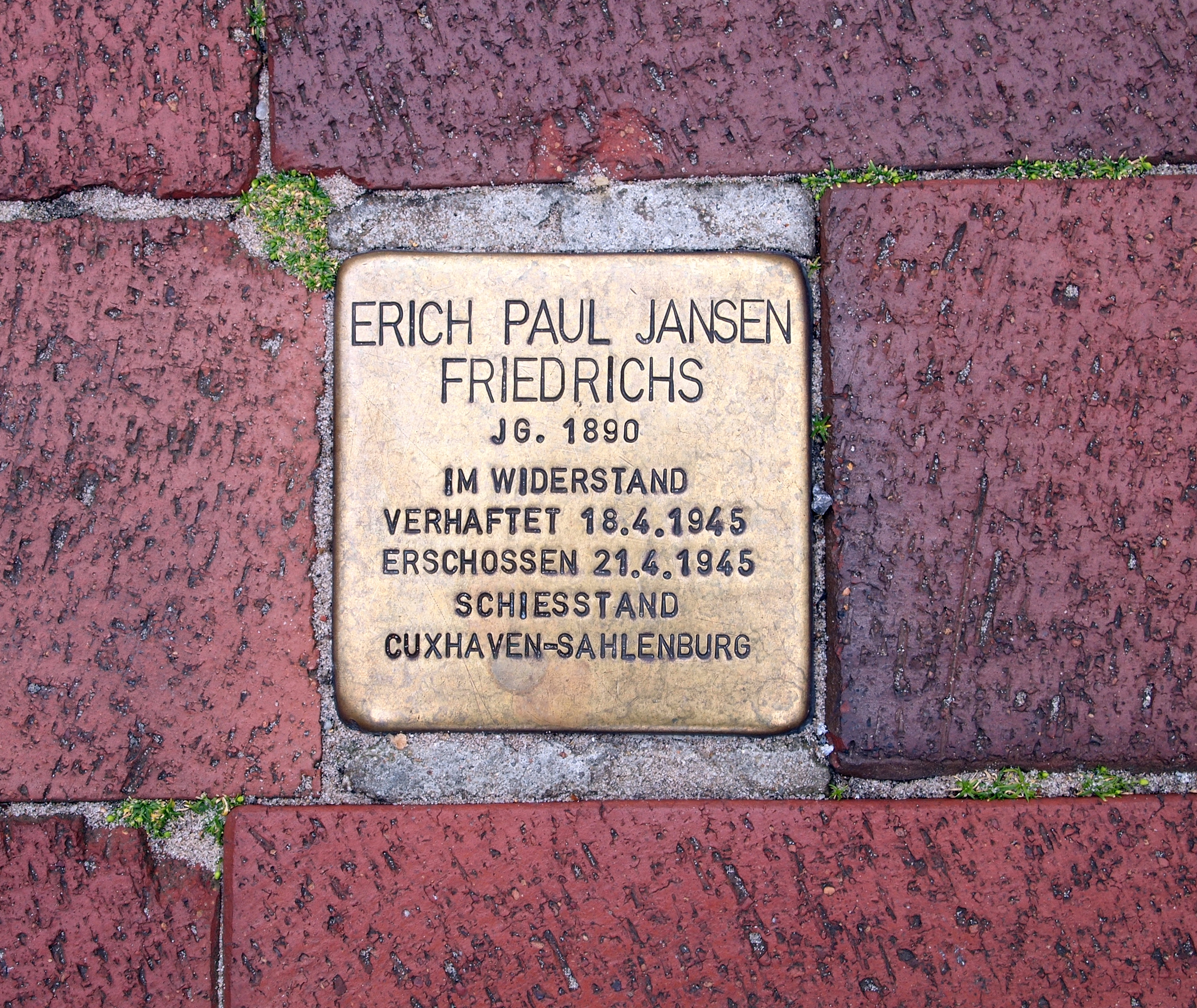 Stolperstein auf Helgoland für Erich Paul Jansen Friedrichs, Lungwai Ecke Friesenstraße, Unterland